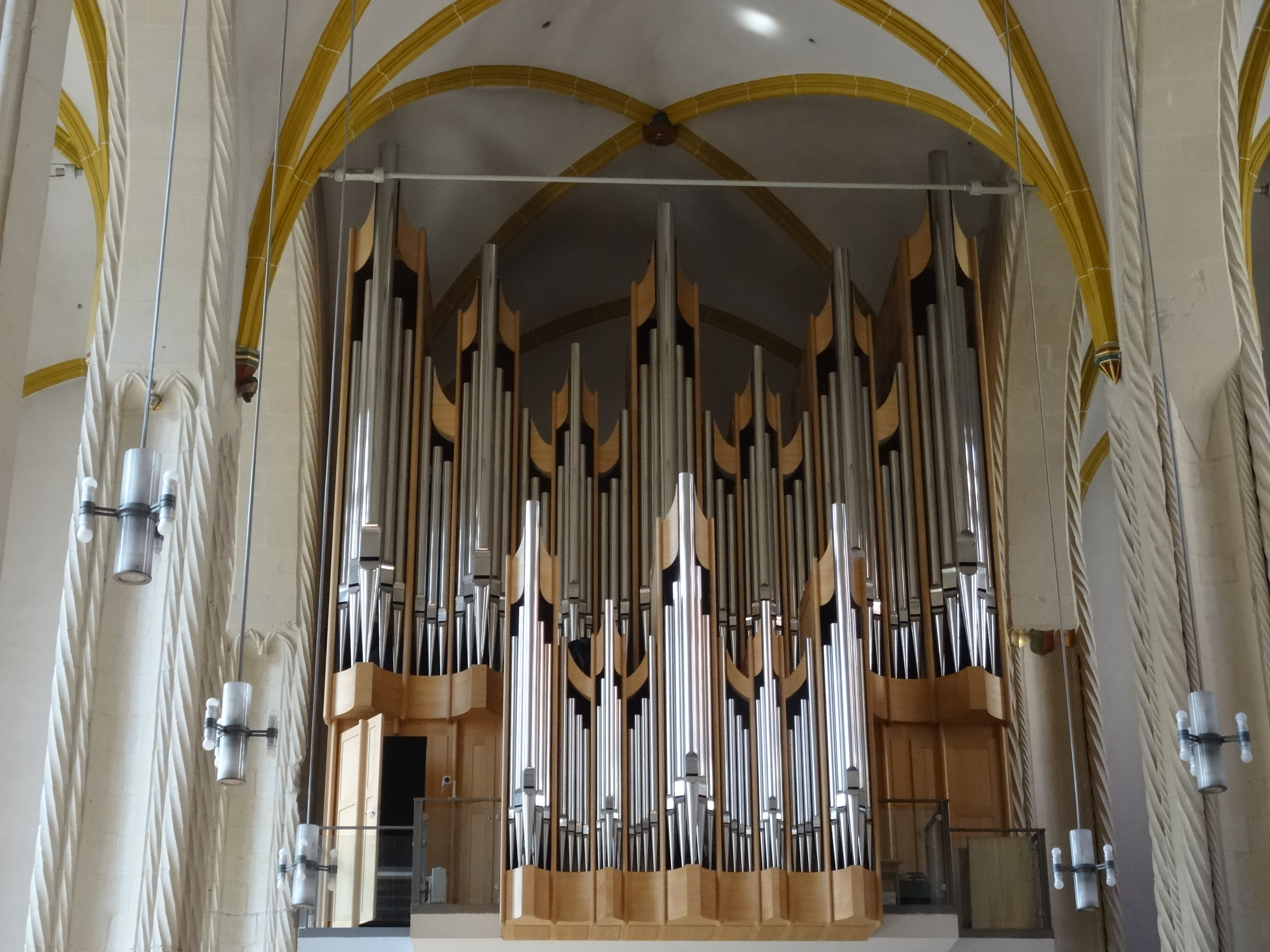 Eule-Orgel von 2005 in St. Sebastian, Magdeburg